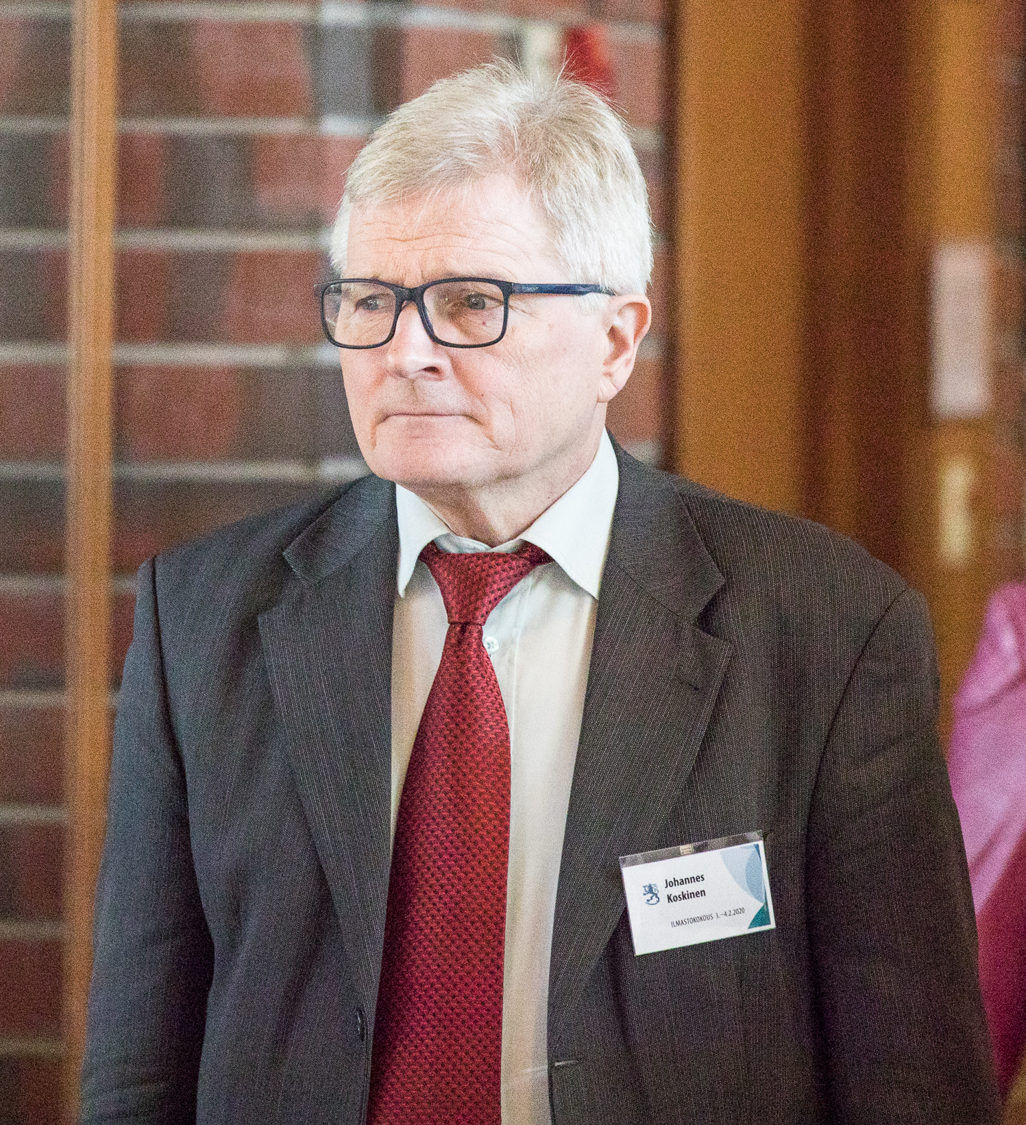 Hallitus ja hallituspuolueiden eduskuntaryhmät kokoontuivat yhteiseen ilmastokokoukseen Helsingin Vuosaareen.